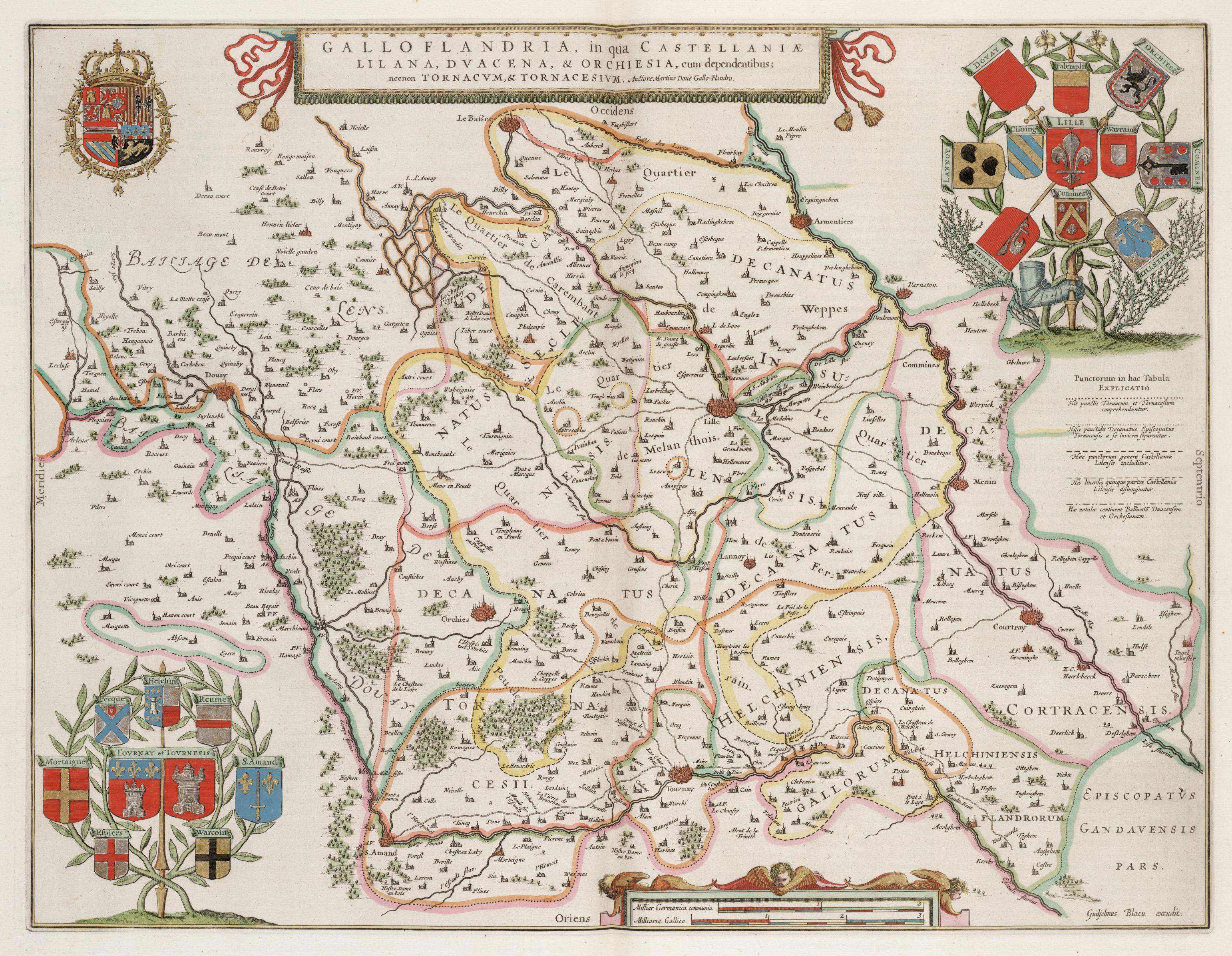 Frans-Vlaanderen, door Willem Janszoon Blaeu.